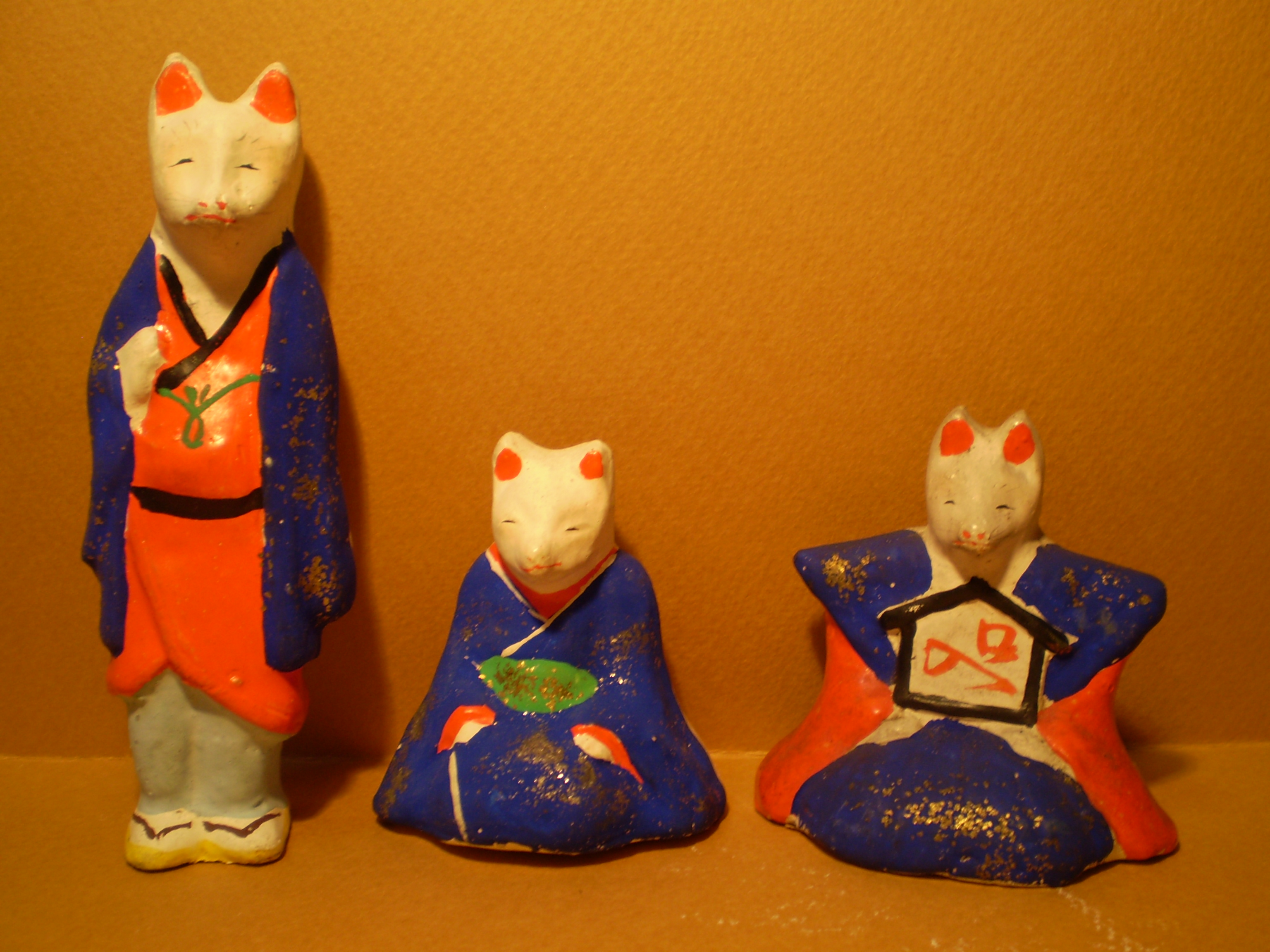 今戸人形「羽織狐」（左）と「口入狐・男女（中・左） 尾張屋 金沢春吉作 （昭和初期） 今戸焼